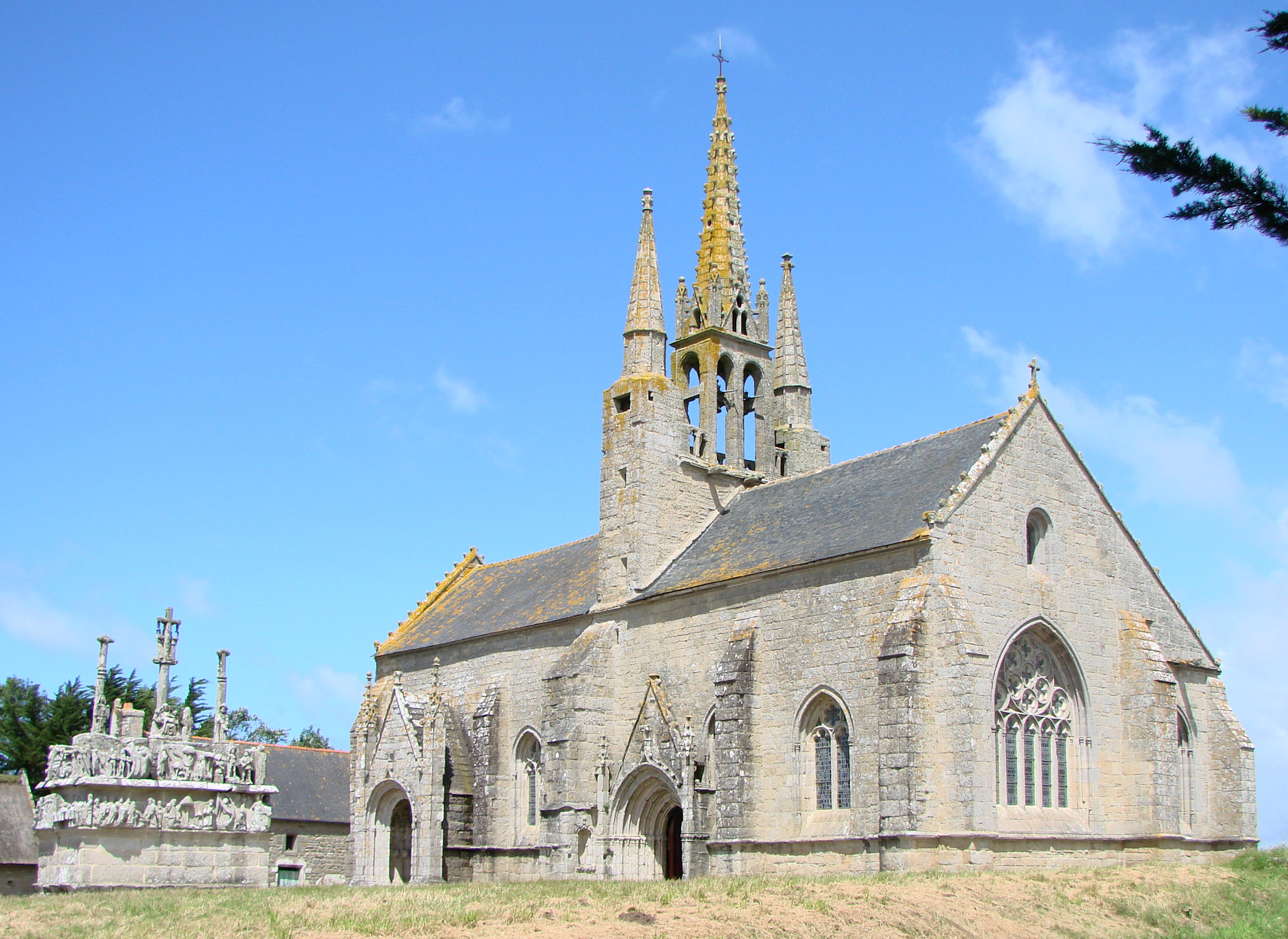 Chapelle de Notre-Dame de Tronoën et son calvaire.XVème siècle.